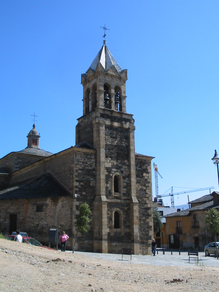 Ilesia de Santu Andrés. Ponferrada